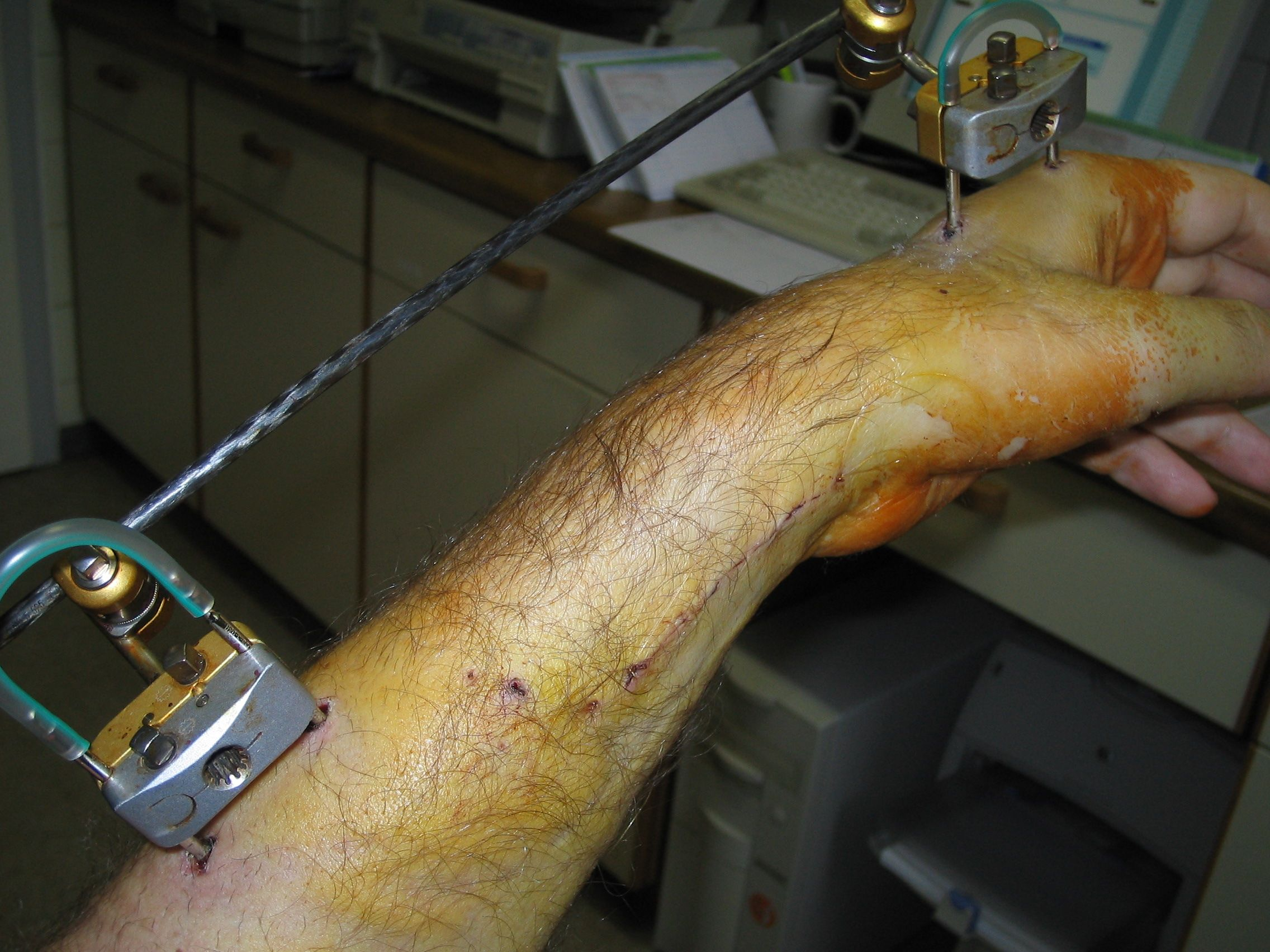 Fixateur-extern